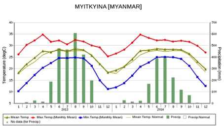 Klimadaten für 2013-2014 aus Mytkyin